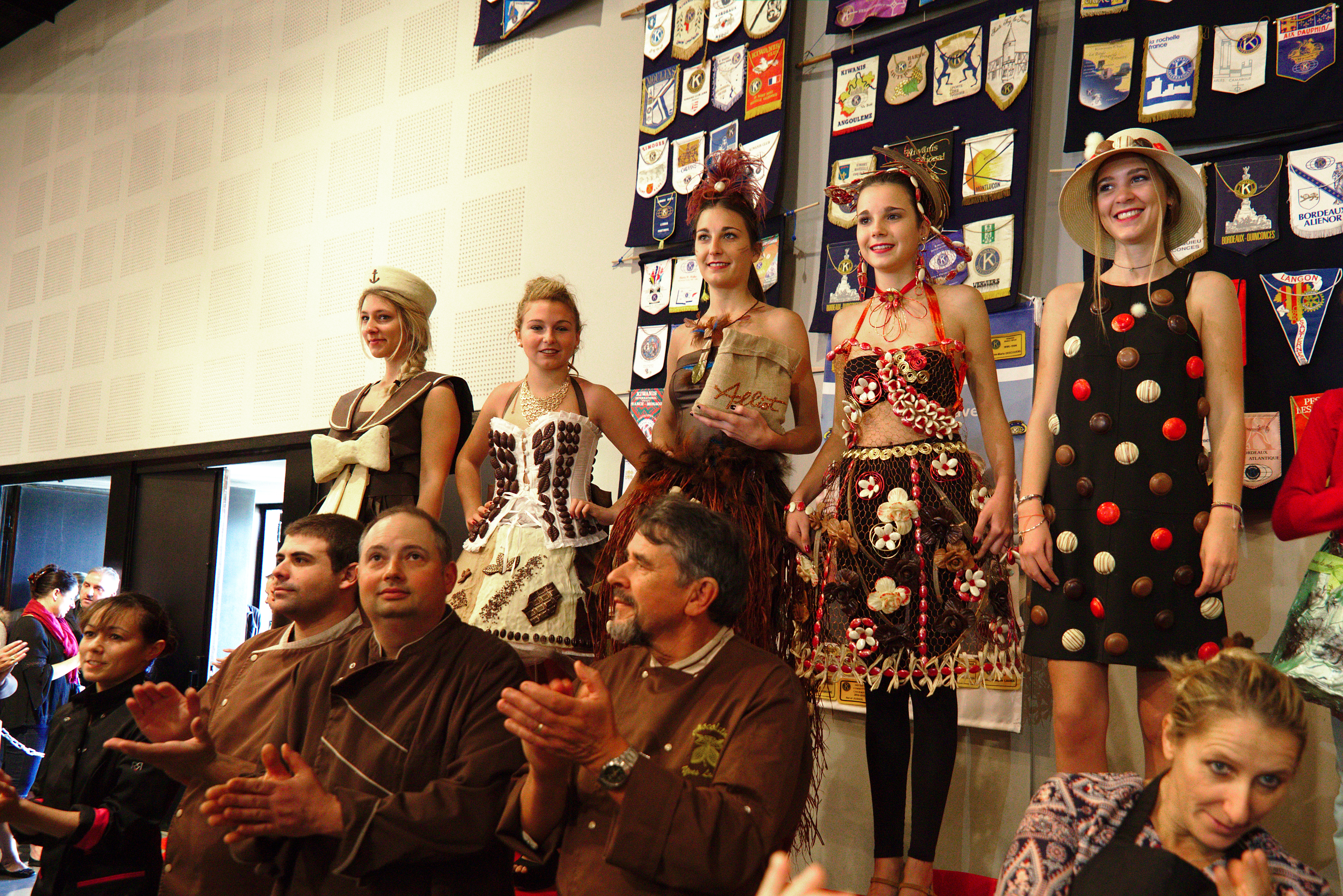 Les mannequins et leur chocolatier.